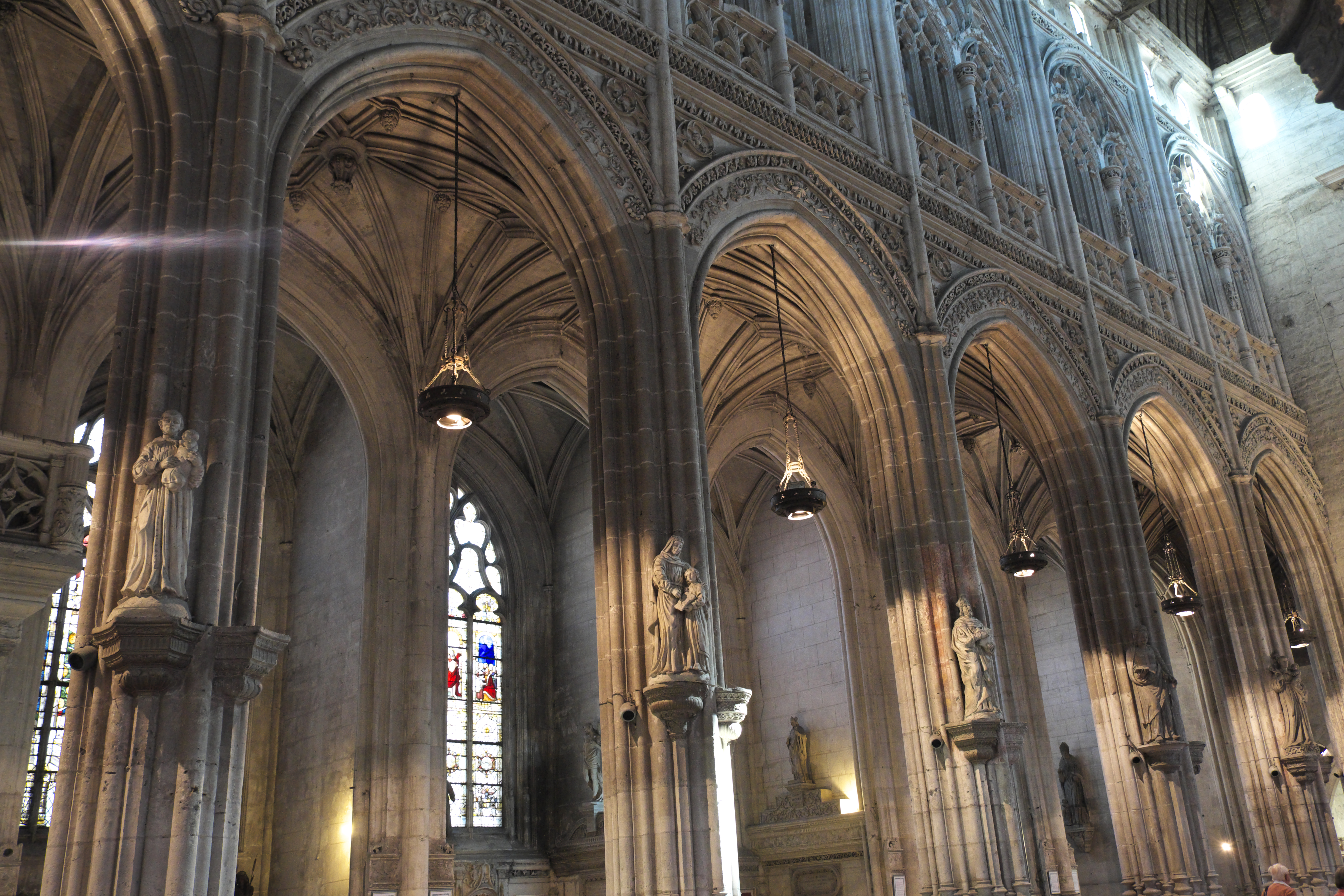 Katholische Kirche Saint-Ouen in Pont-Audemer im Département Eure (Haute-Normandie/Frankreich), Arkaden des Mittelschiffs